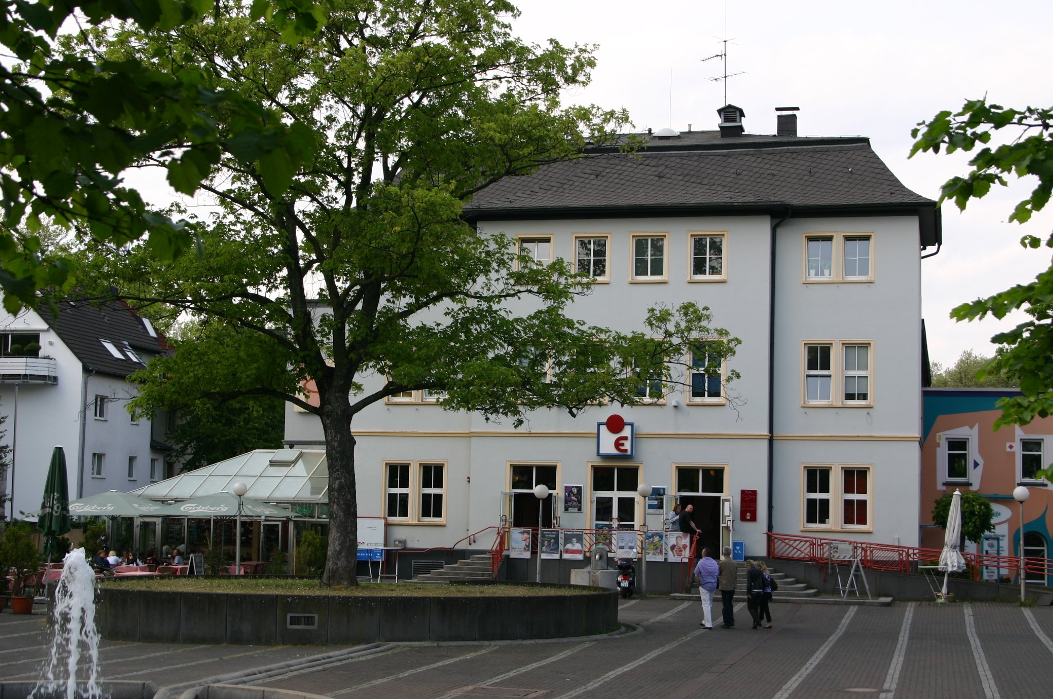 Ebertbad, früher Schwimmbad, heute Kleinkunstbühne in Oberhausen